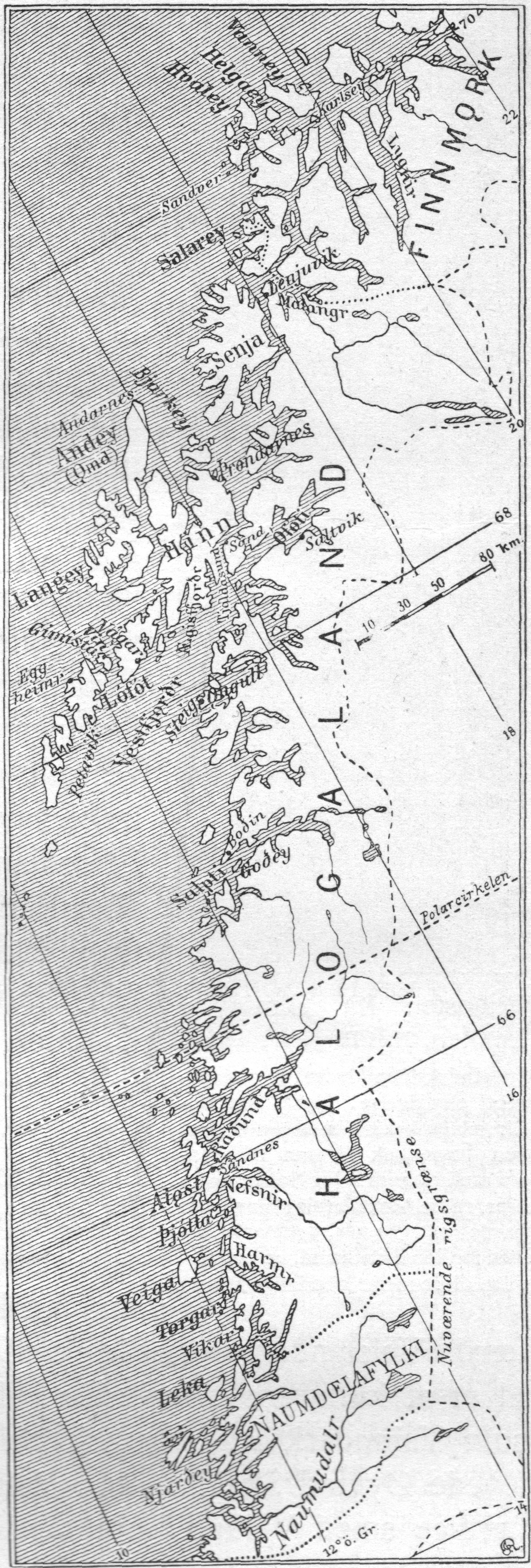 Kart over Hålogaland i middelalderen.